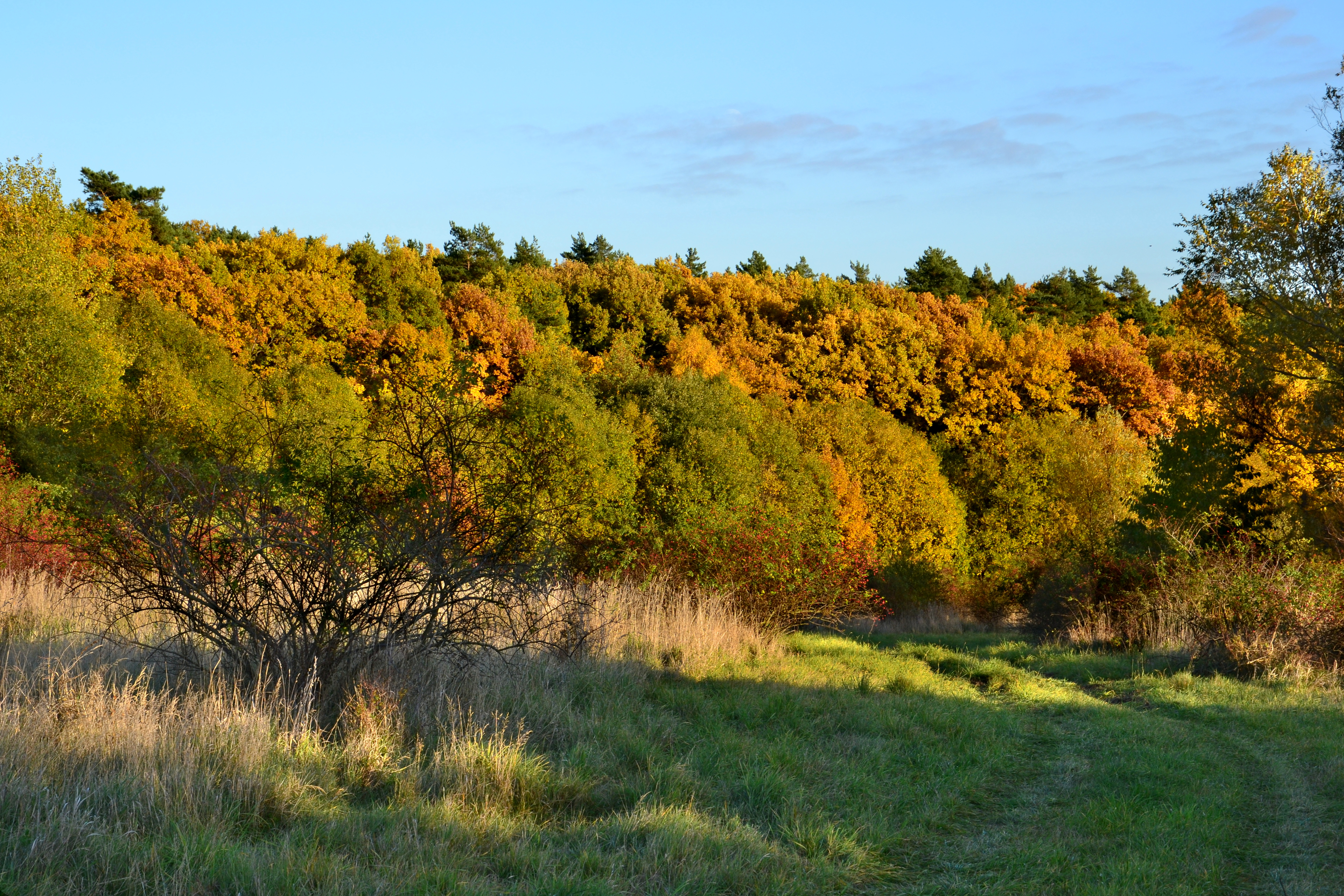 Západní okraj chráněného území